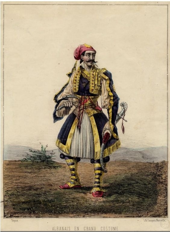 Ritratto di Hajri Athanas Lesko Hitaj, cavaliere epiriota. Il ritratto è stato realizzato alla fine della prima metà del 1800 per conto di una rivista francese.